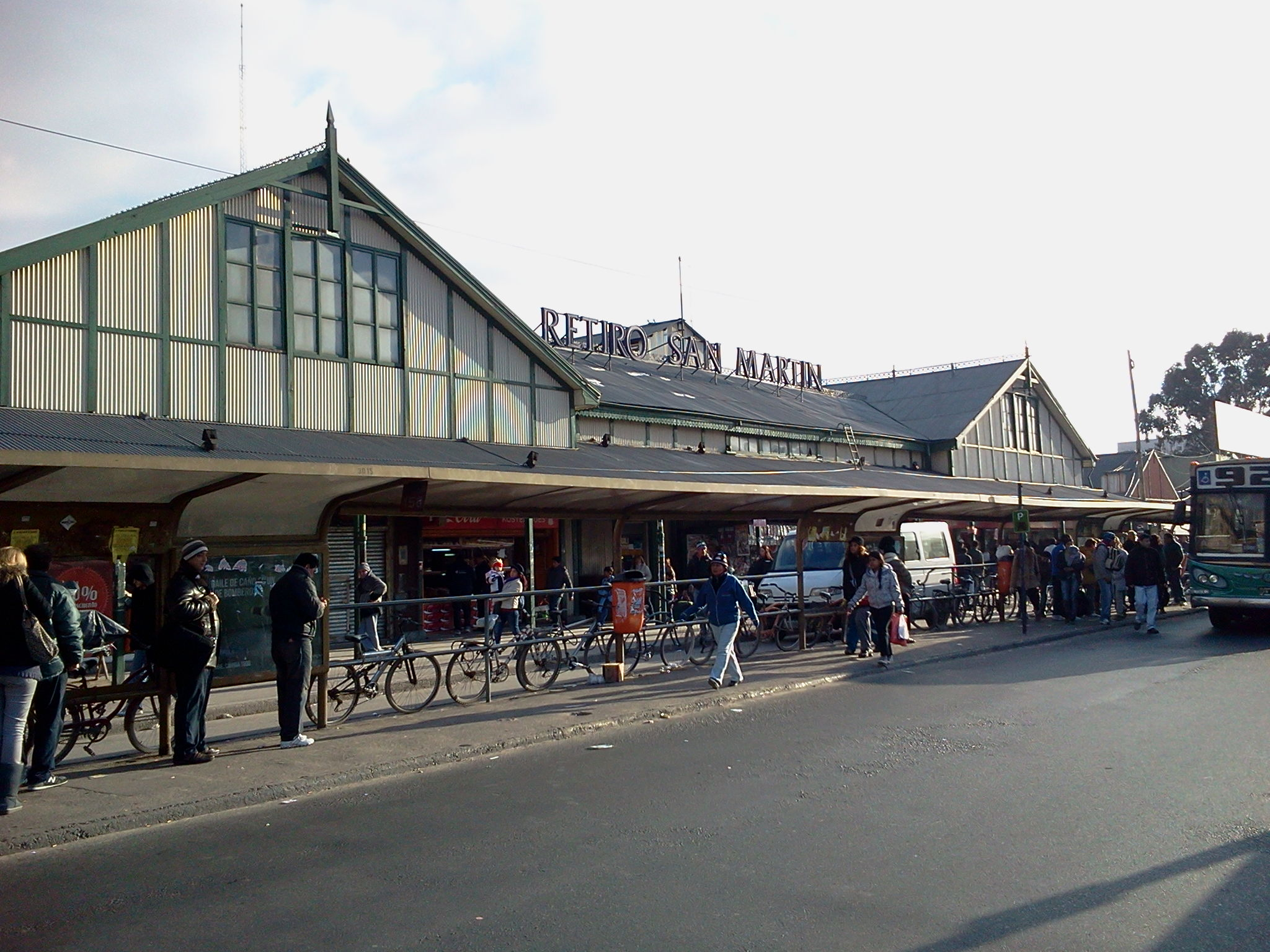 Entrada